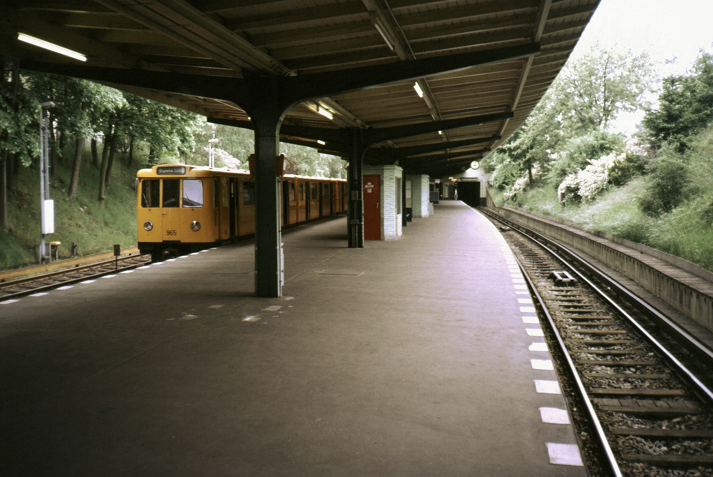 U-Bahnhof Krumme Lanke (Berlin)